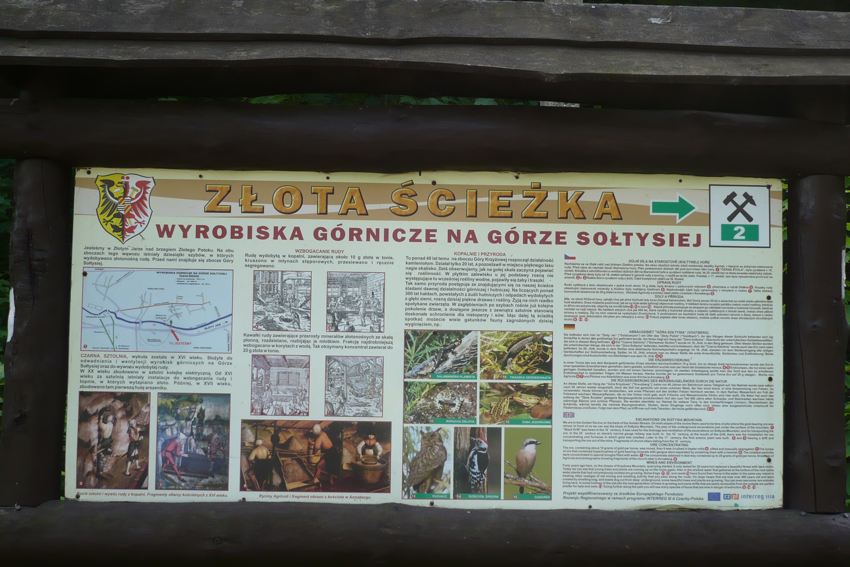 Złoty Stok